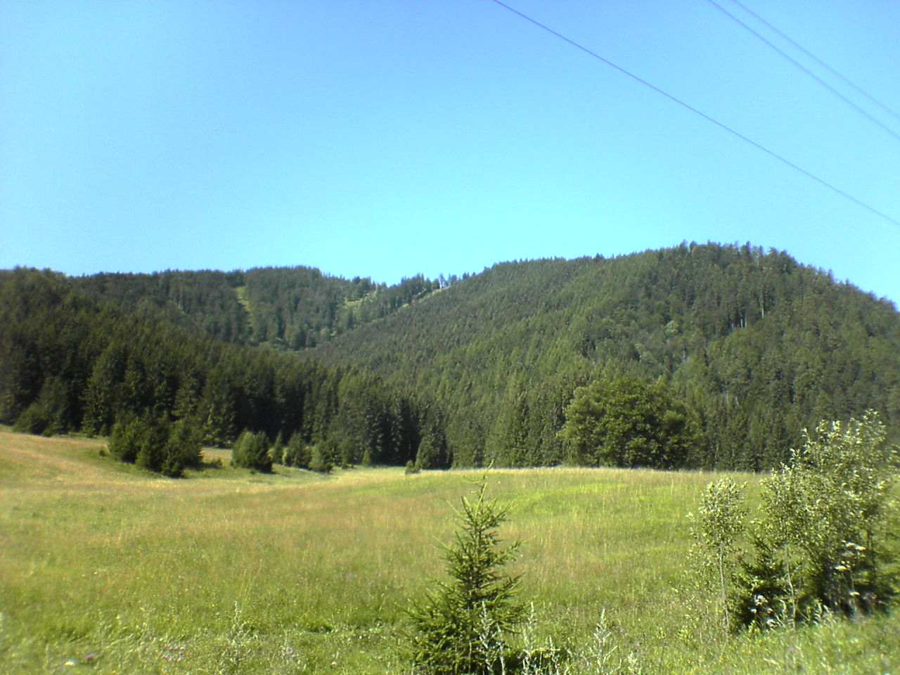 Čiernovážska Valley, the Middle